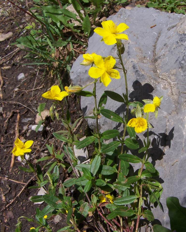 Helianthemum grandiflorum (pl: posłonek rozesłany wielkokwiatowy). Habitat: Tatra Mountains, Ornak